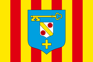 Bandera de Vedène